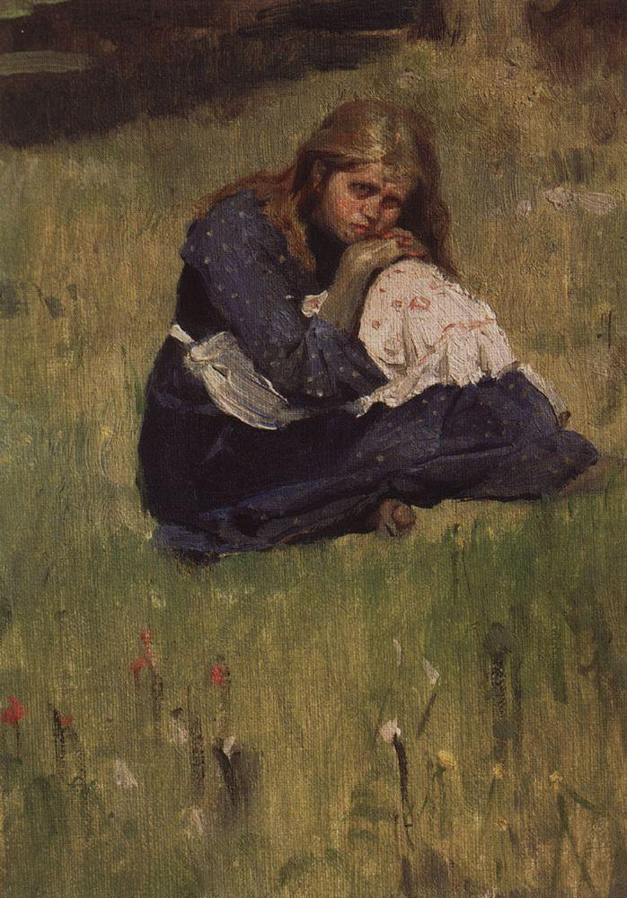 Аленушка.Этюд